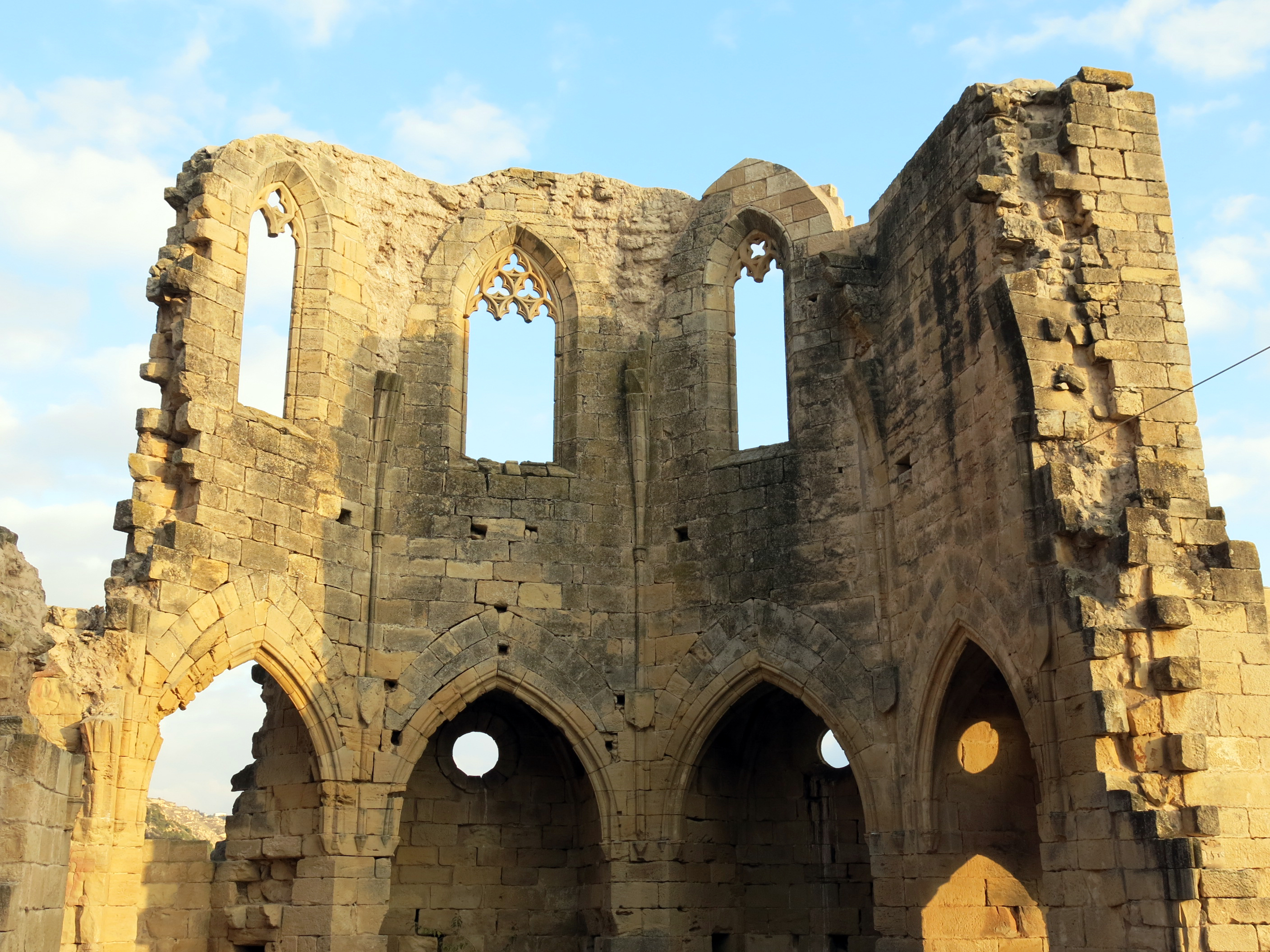 Restes del monestir de Vallsanta (Guimerà)